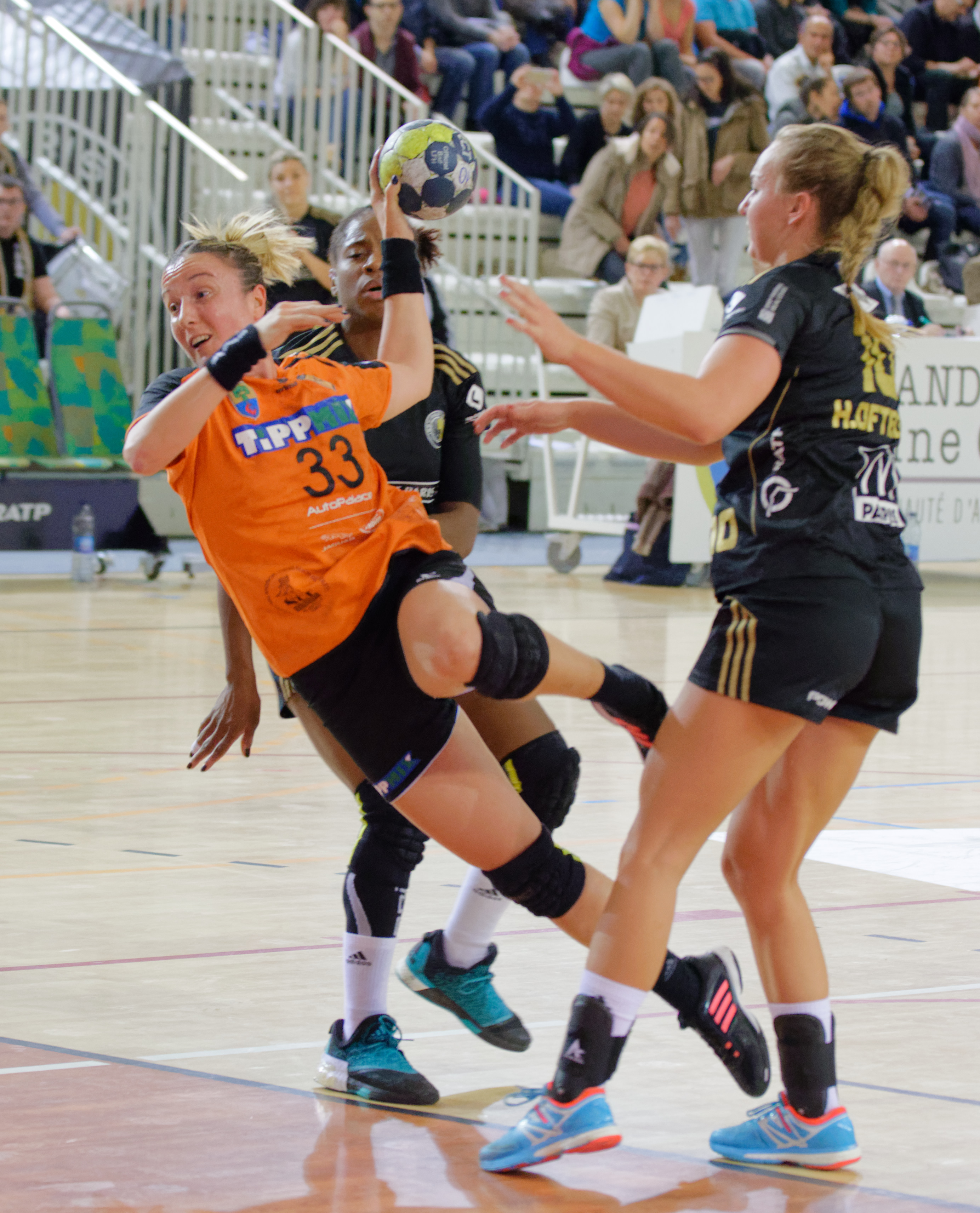 Rencontre du 2e tour de la coupe EHF entre Issy Paris Hand et Érd HC. A Issy Les Moulineaux, le 23 octobre 2016.